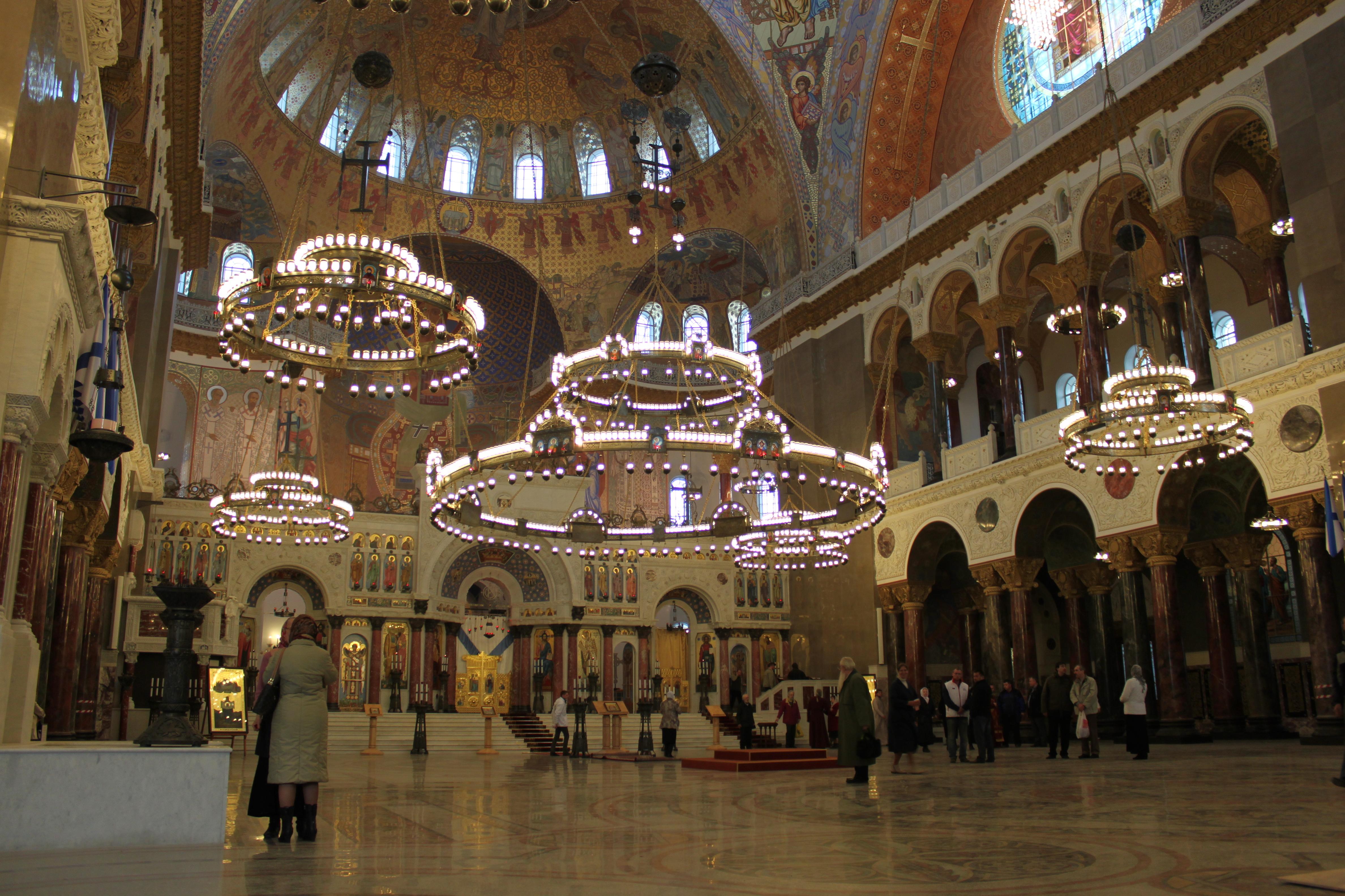 Собор Никольский Морской (Санкт-Петербург, Кронштадт, Якорная площадь, 5)